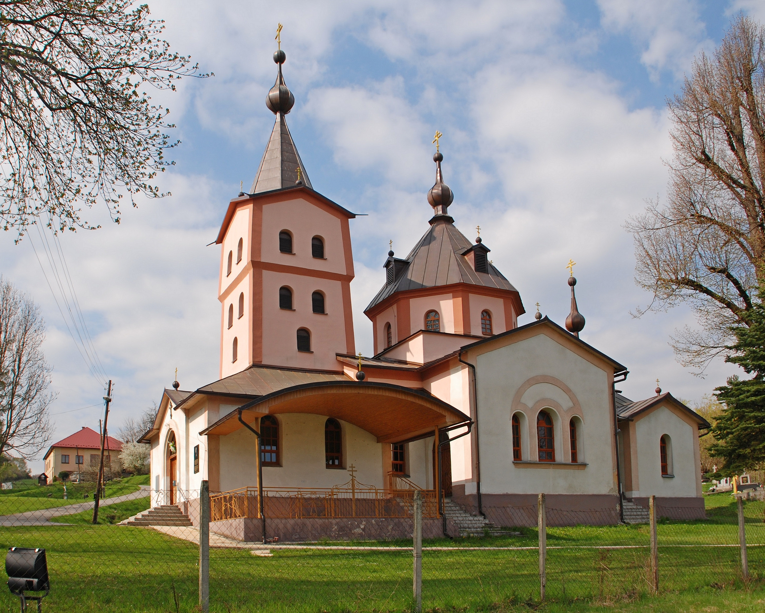 wieś Ladomirová